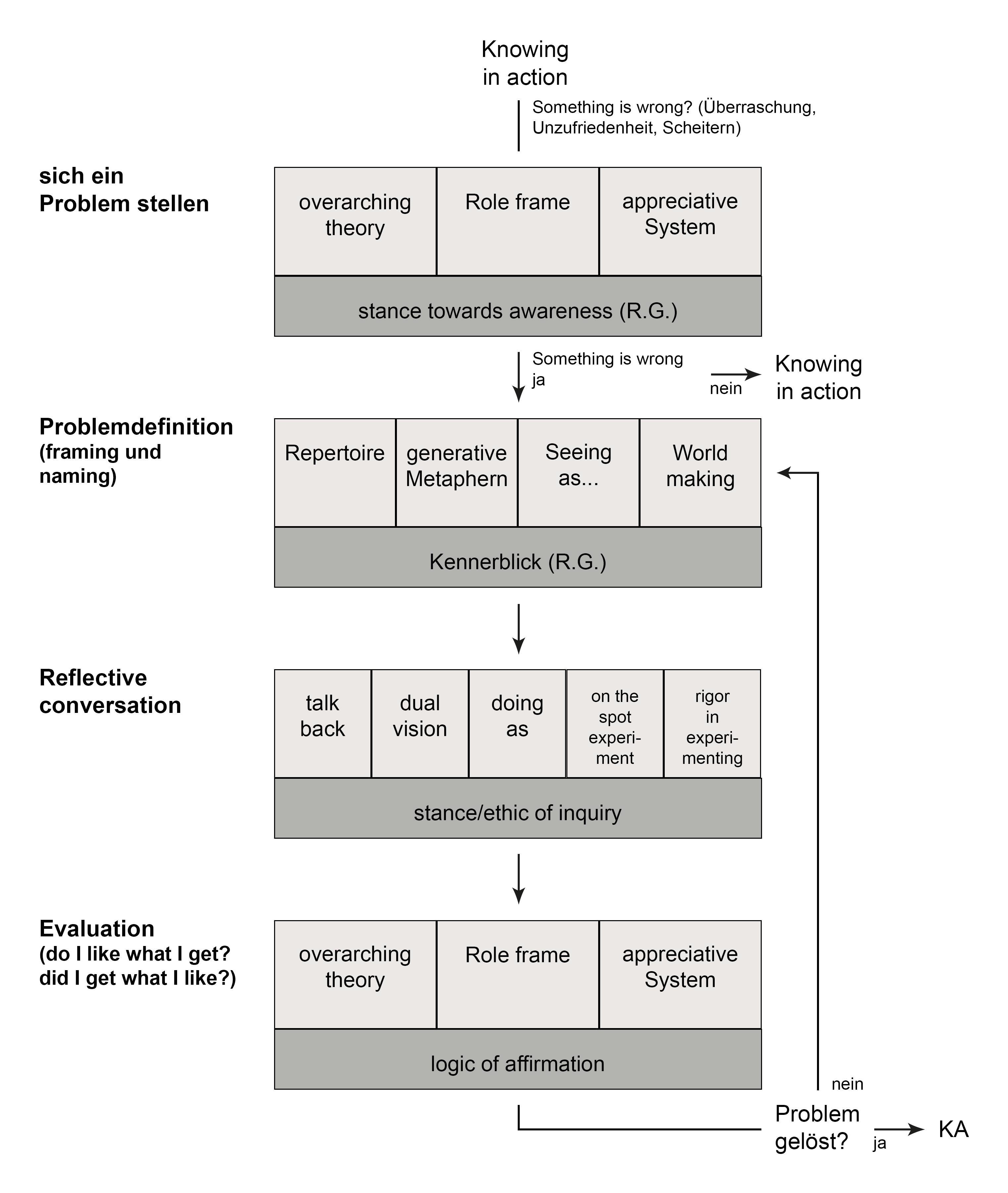 Schematische Darstellung des Handlungstypus Knowing in Action nach Donald Schön